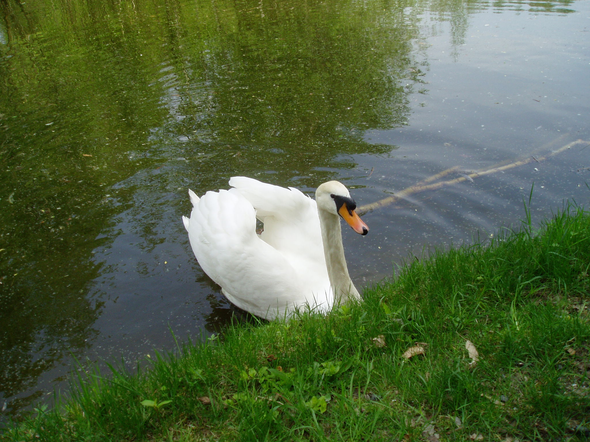 Arborétum Tesárske Mlyňany, Slovensko